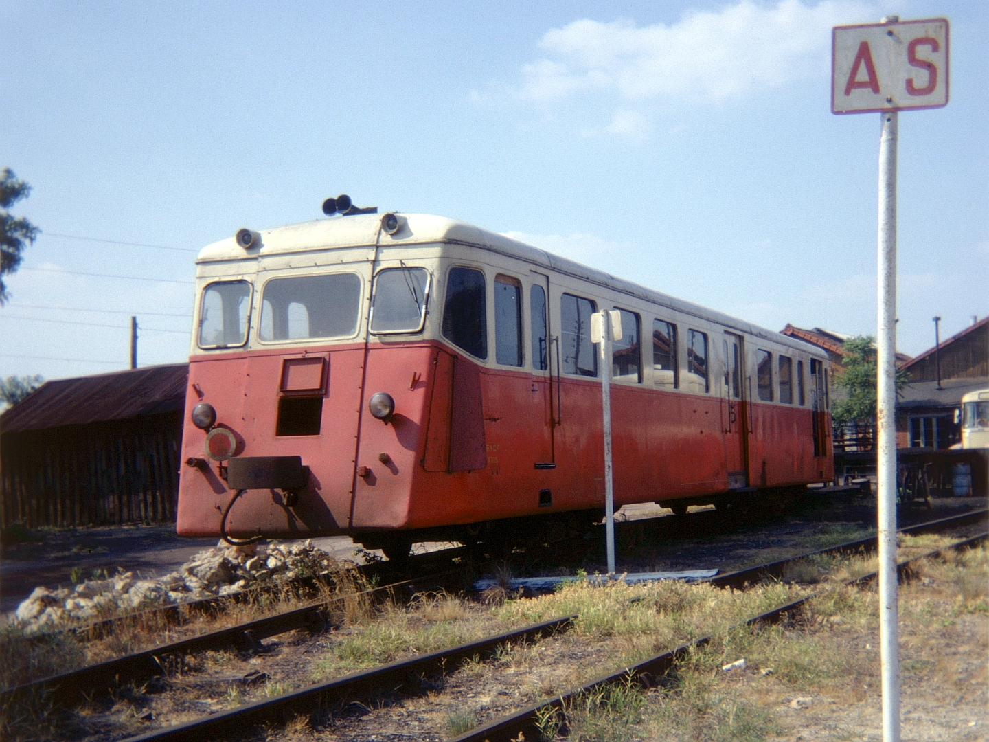 L'autorail X 205 De Dion Bouton type OC2 du chemin de fer du Blanc-Argent stationne au dépôt de Romorantin.